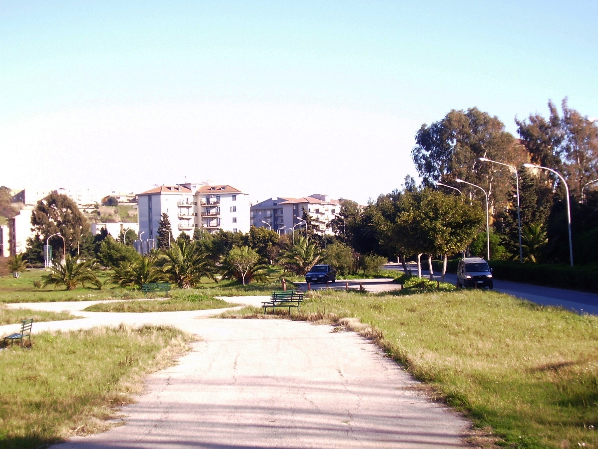 Il quartiere gelese